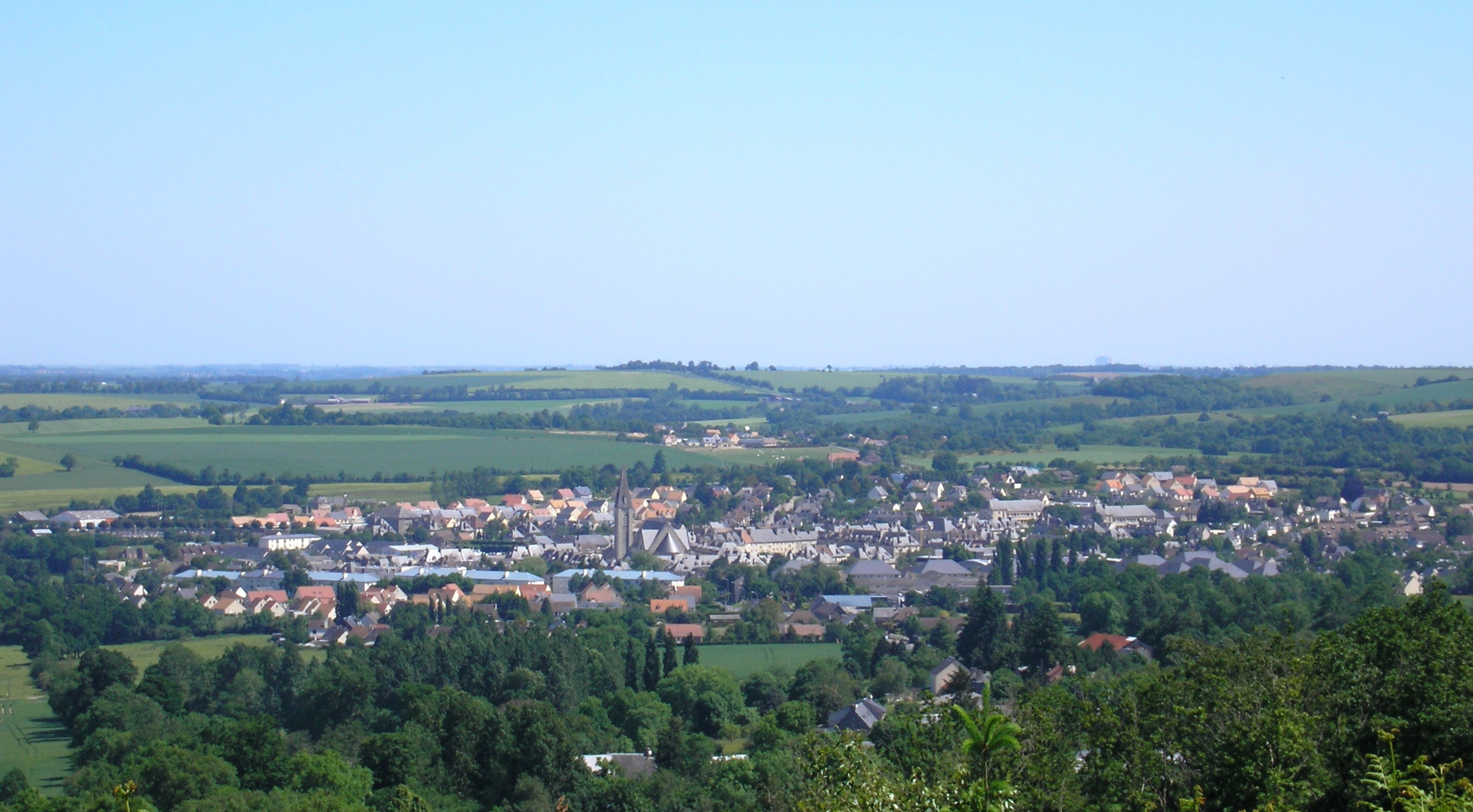 Aunay-sur-Odon (Normandie, France). Vue générale du bourg.